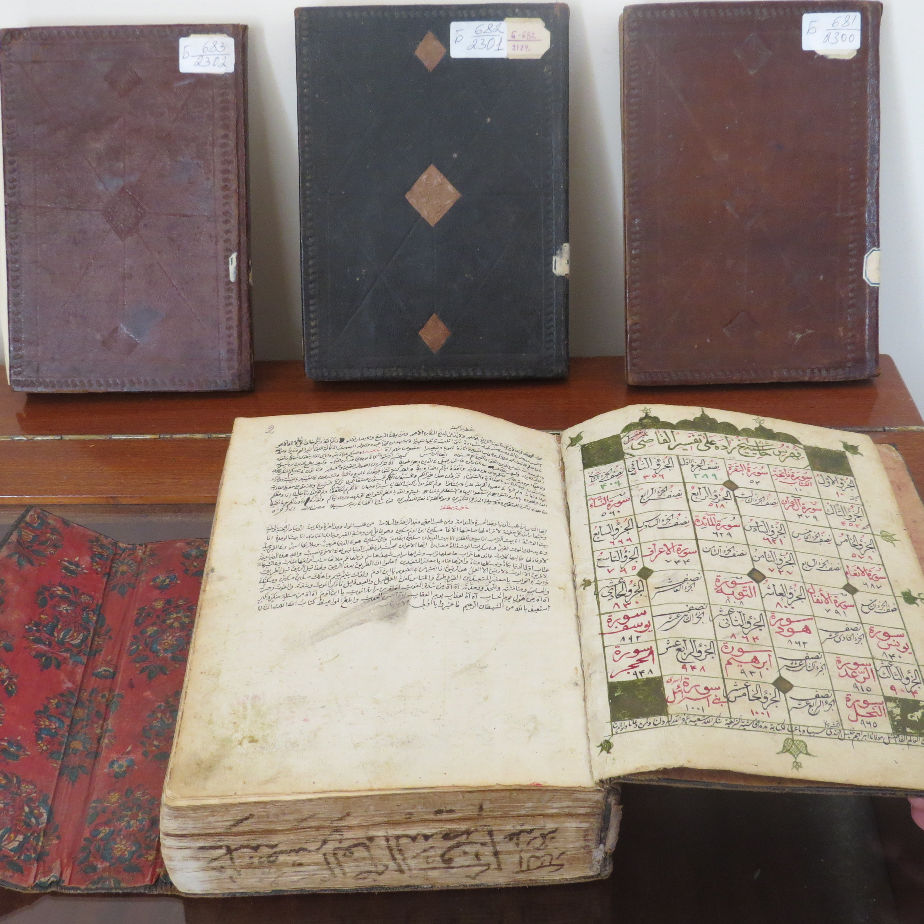 Əlyazma